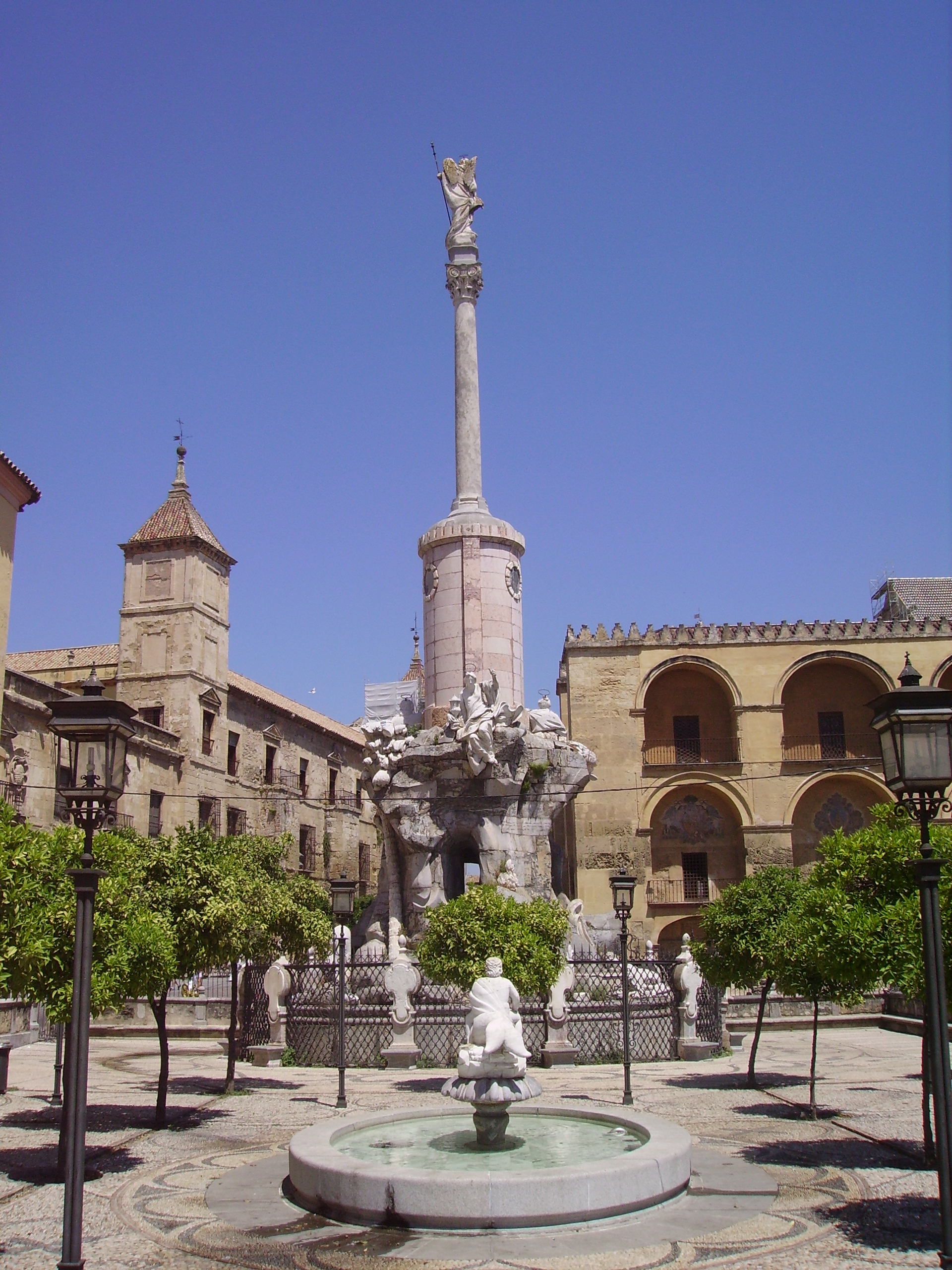 Triunfo de San Rafael de la Puerta del Puente, en Córdoba (España).